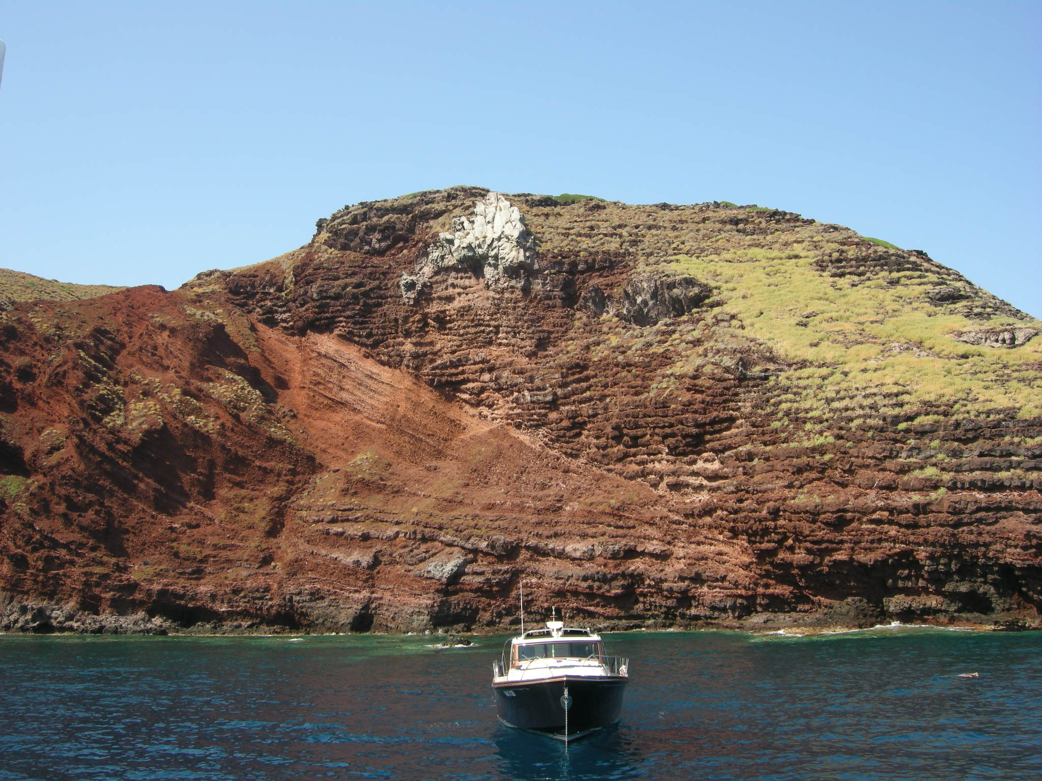 Capraia, giro periplo 87 cala rossa